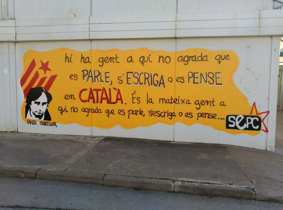 Mural del Sindicat d'Estudiants dels Països Catalans, de l'any 2014 al campus de Montilivi de la Universitat de Girona, reproduint l'aforisme reivindicatiu del poeta, autor i cantant Ovidi Montllor sobre l'opressió que rep la llengua catalana.